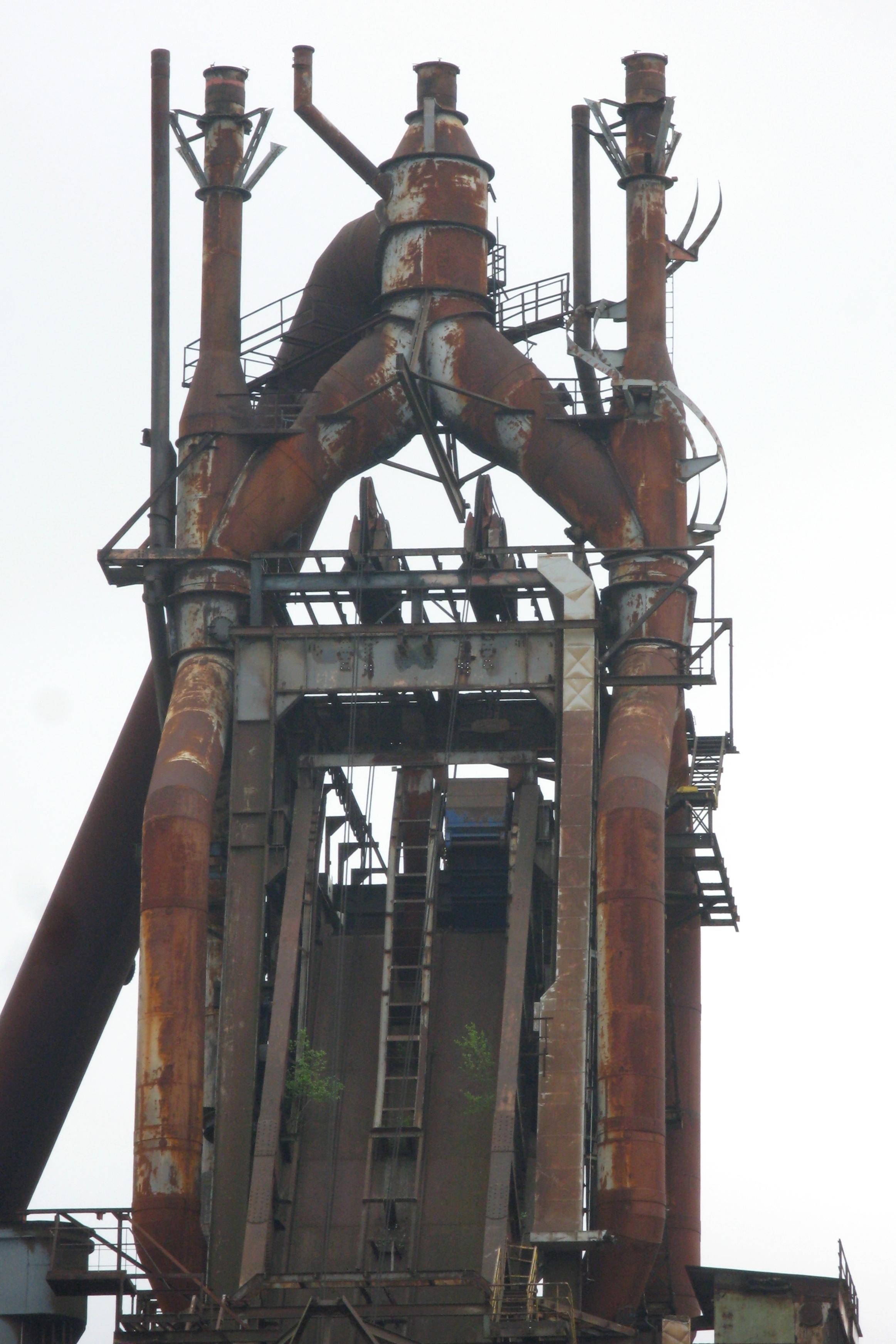 Ieweschten Deel vun engem Héichuewe mat der Giicht.